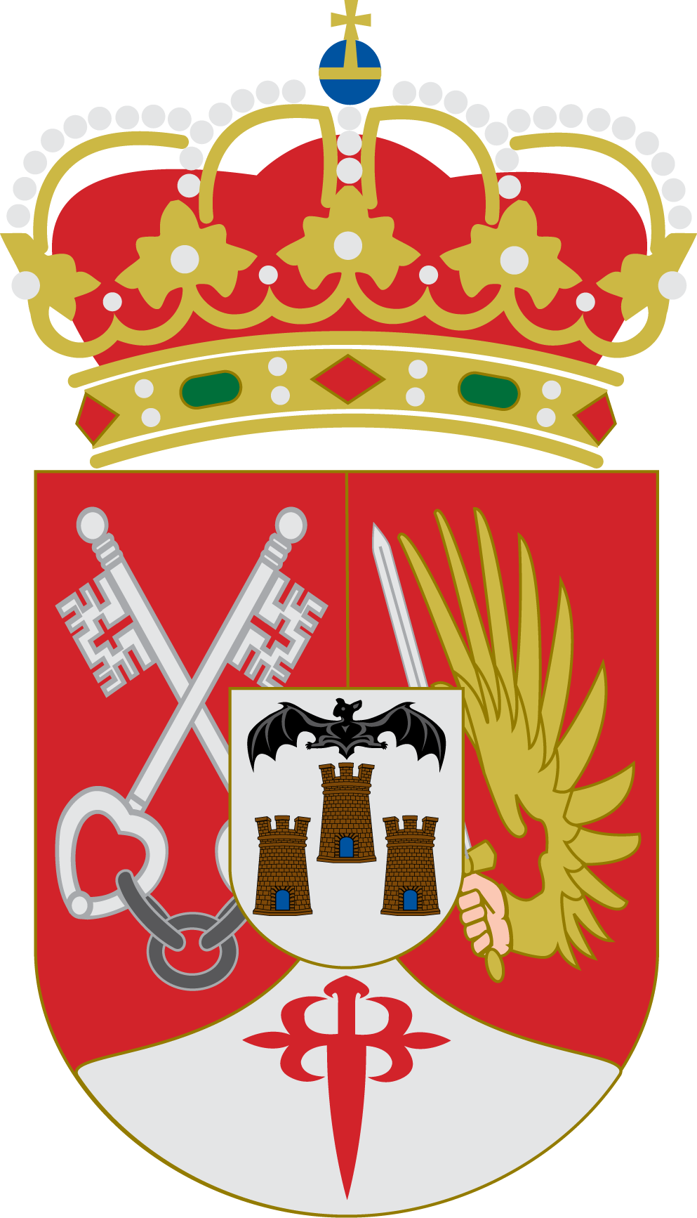 Escudo de la Provincia de Albacete, Castilla-La Mancha, España